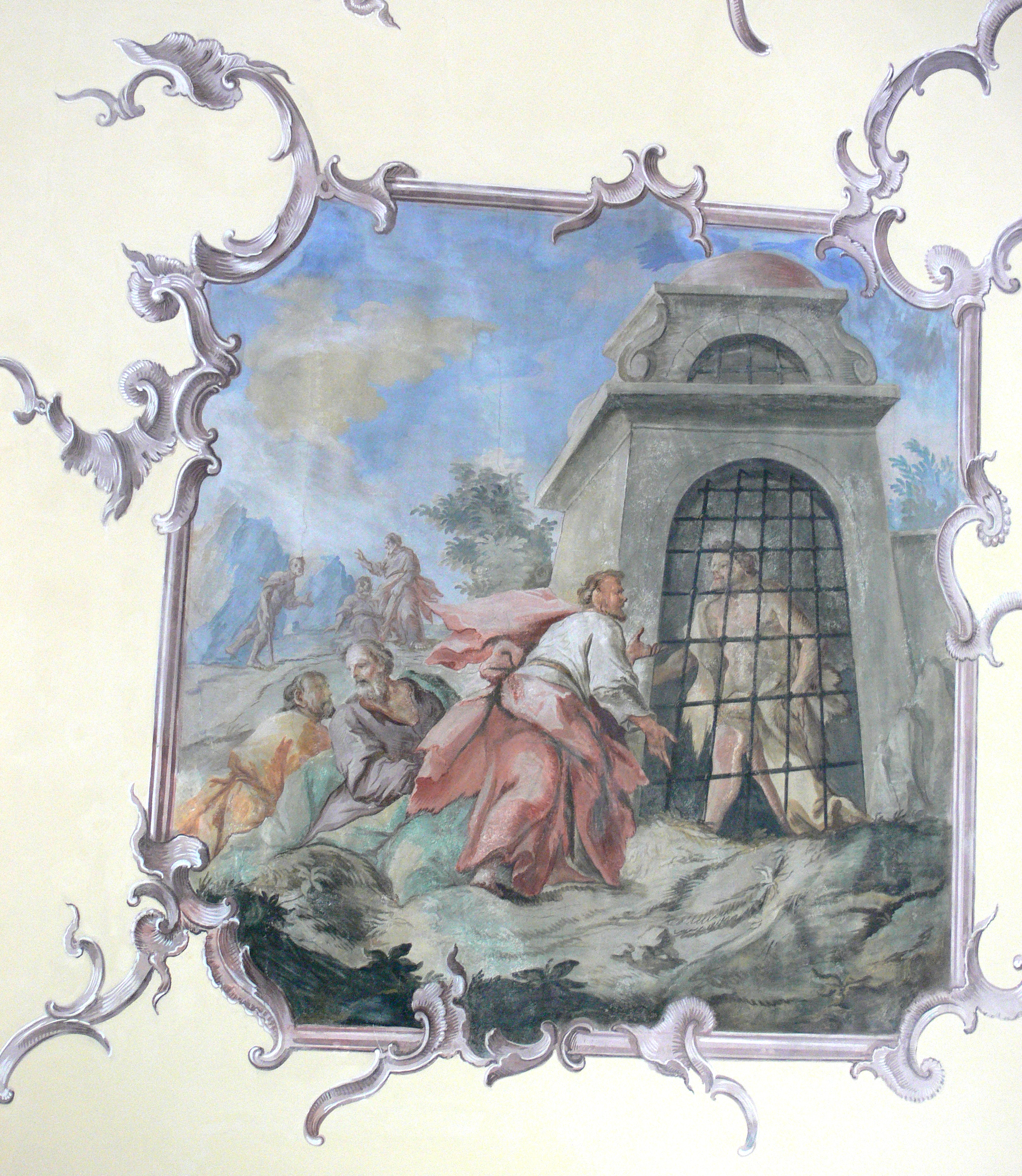 Oberzell, Ortschaft Taldorf, Stadt Ravensburg Kirche zur Schmerzhaften Muttergottes Deckengemälde im Schiff: "Johannes der Täufer im Kerker" (mit den als Boten zu Jesus gesandten Jüngern) von Josef Anton Hafner, um 1750